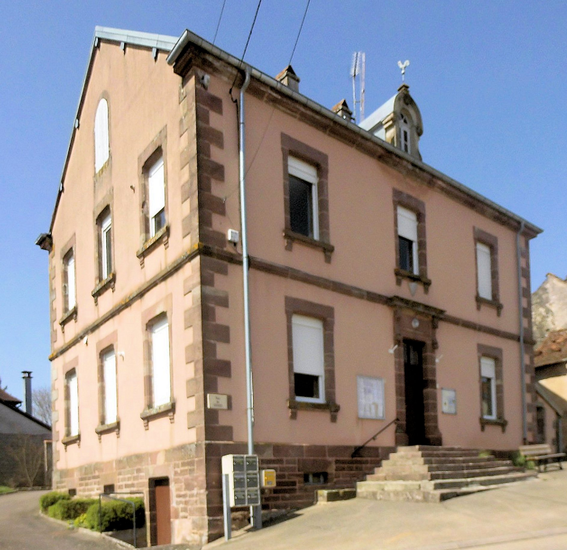 La mairie de Betoncourt-Saint-Pancras